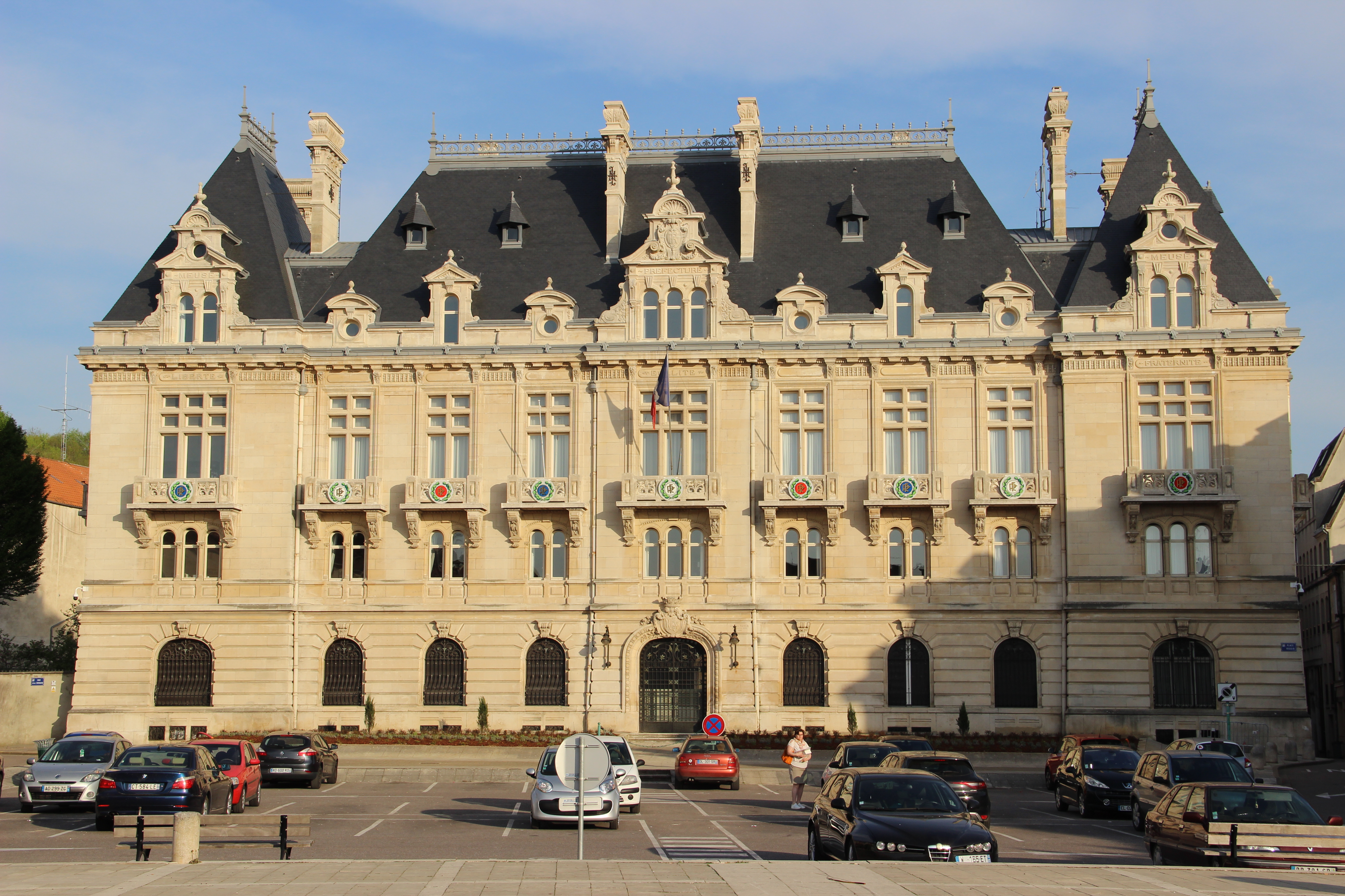 Hôtel de la Préfecture, place Reggio.